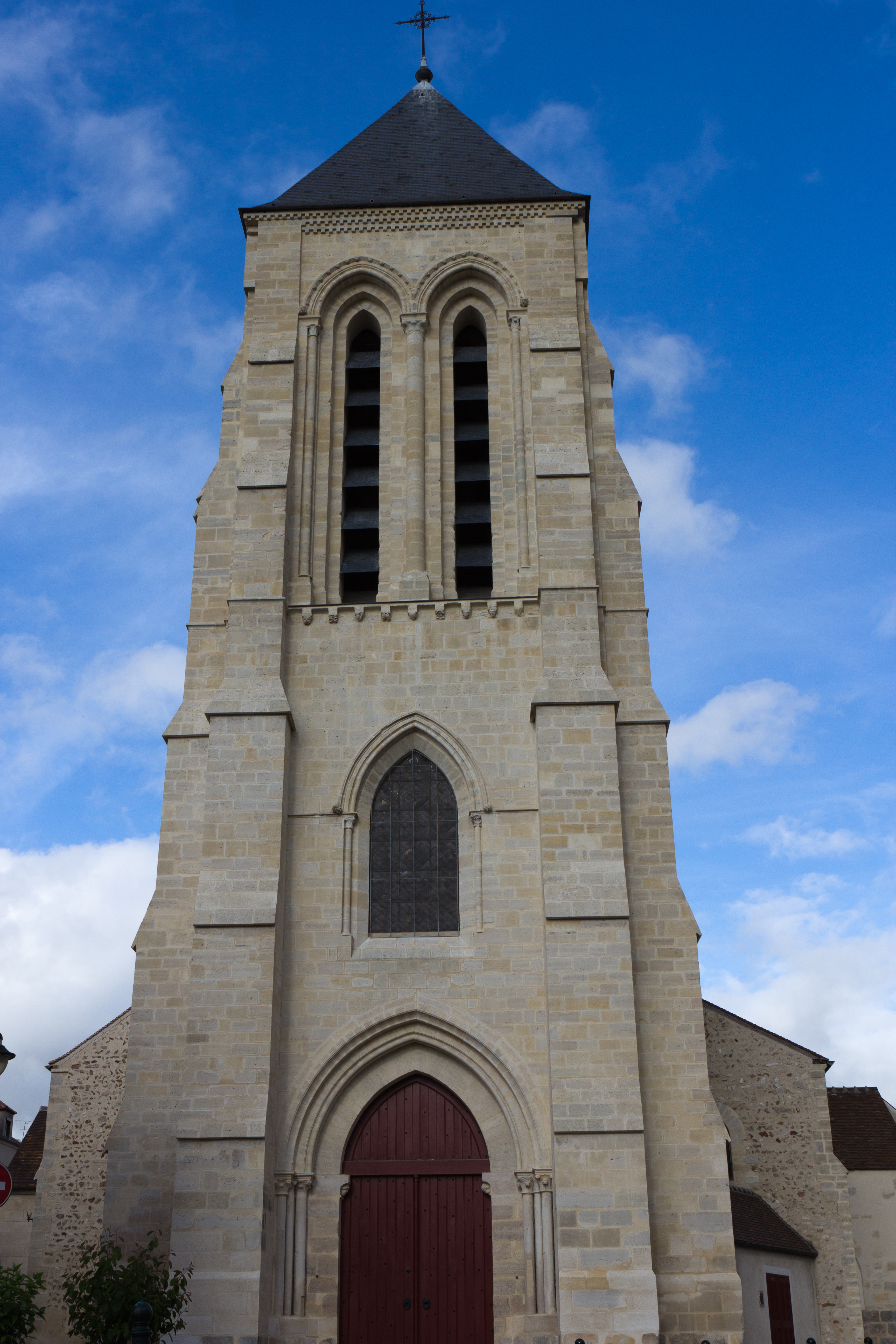 Cathédrale Saint-Spire de Corbeil-Essonnes, Corbeil-Essonnes, Essone, France